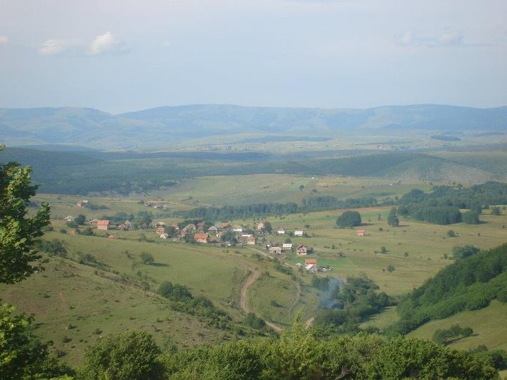 Читлук